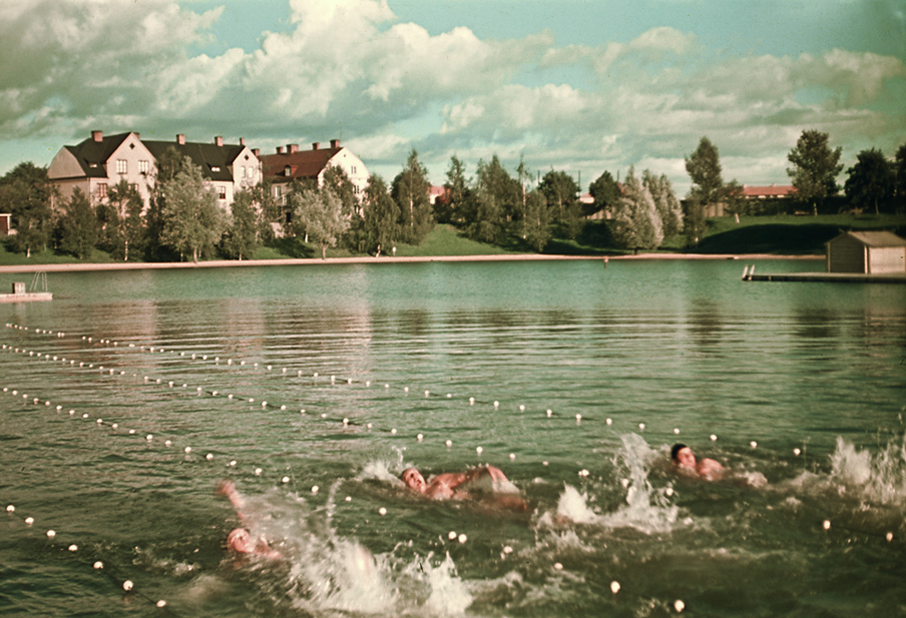 Swimmers at Tinnerbäcksbadet open-air bathe in Linköping. Simmare i Tinnerbäcksbadet i Linköping. Parish (socken): Linköping Province (landskap): Östergötland Municipality (kommun): Linköping County (län): Östergötland Photograph by: Fredrik Bruno Date: 1943 Format: Colour slide Persistent URL: Read more about the photo database (in english)